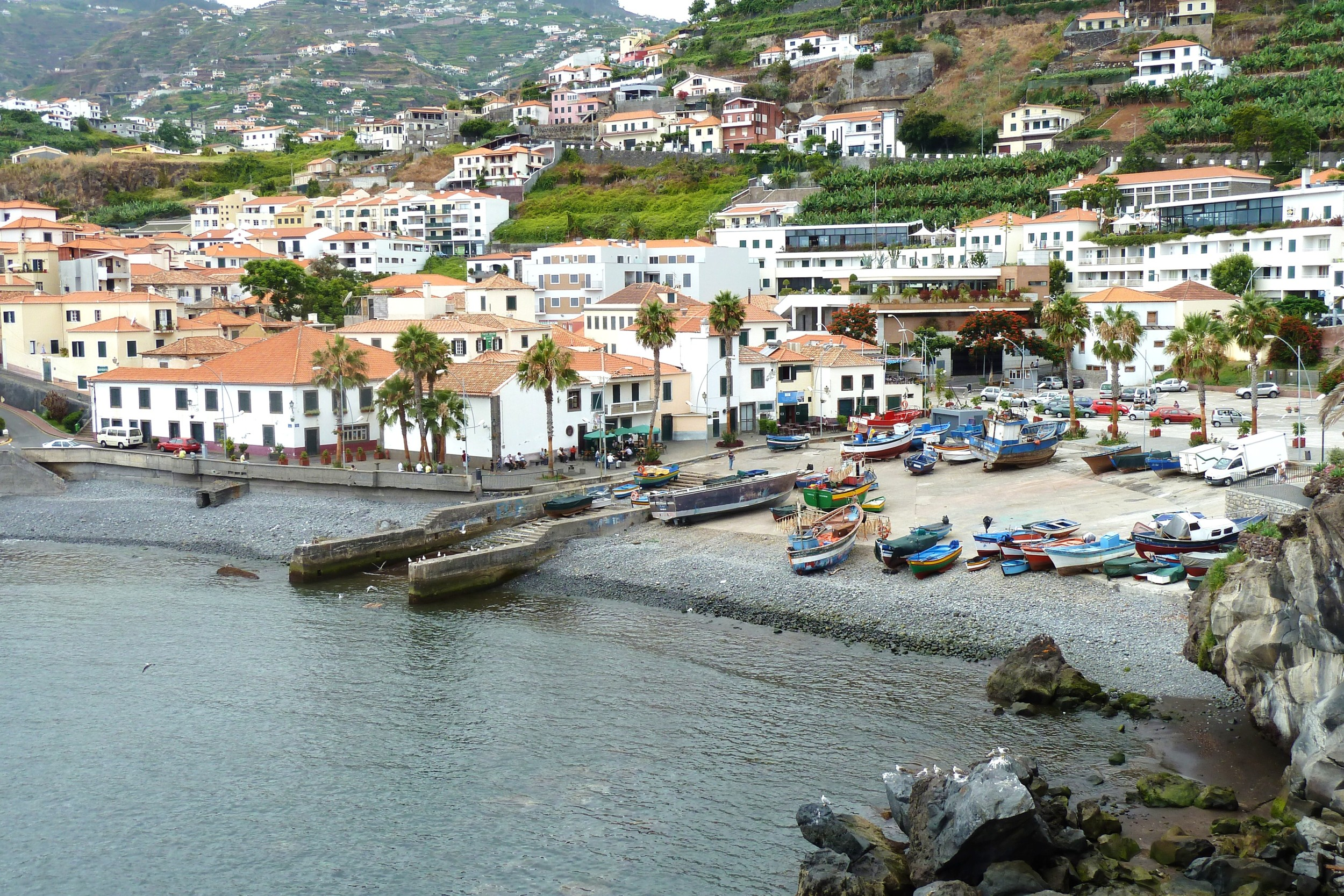 Camara de Lobos, Stadt westlich von Funchal auf Madeira